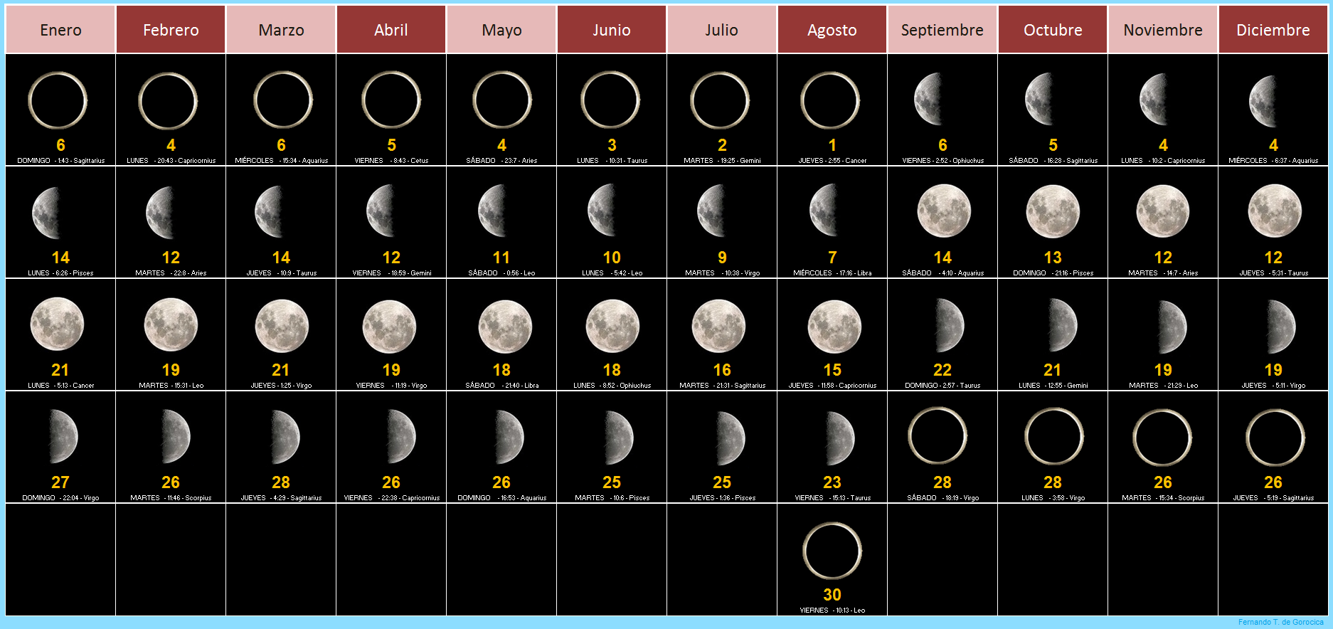 CALENDARIO LUNAR ANUAL 2019. Las 4 fases lunares en todo el año 2019 y para observadores del hemisferio Sur. Para cada fase se describe: día del mes, día de la semana, hora de la fase en Tiempo Universal (Greenwich) y constelación.